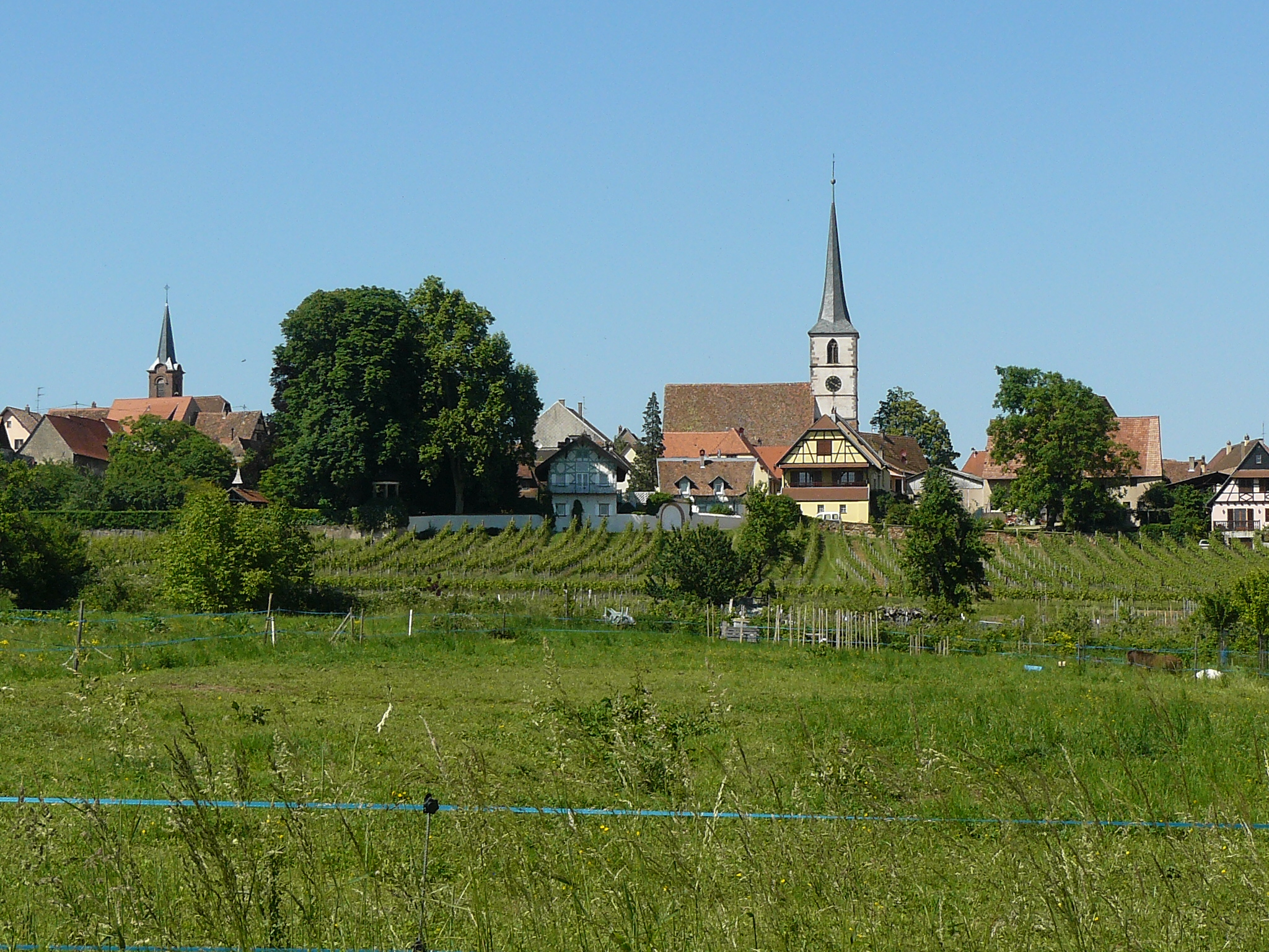 Village de Mittelbergheim avec vues sur les églises catholique et protestante